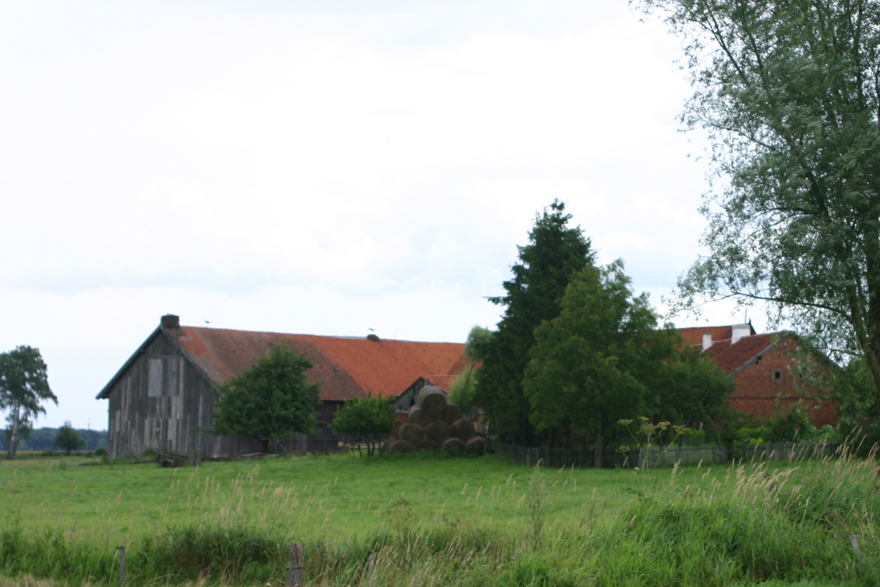 Krelikiejmy - OpenStreetMap(Info)